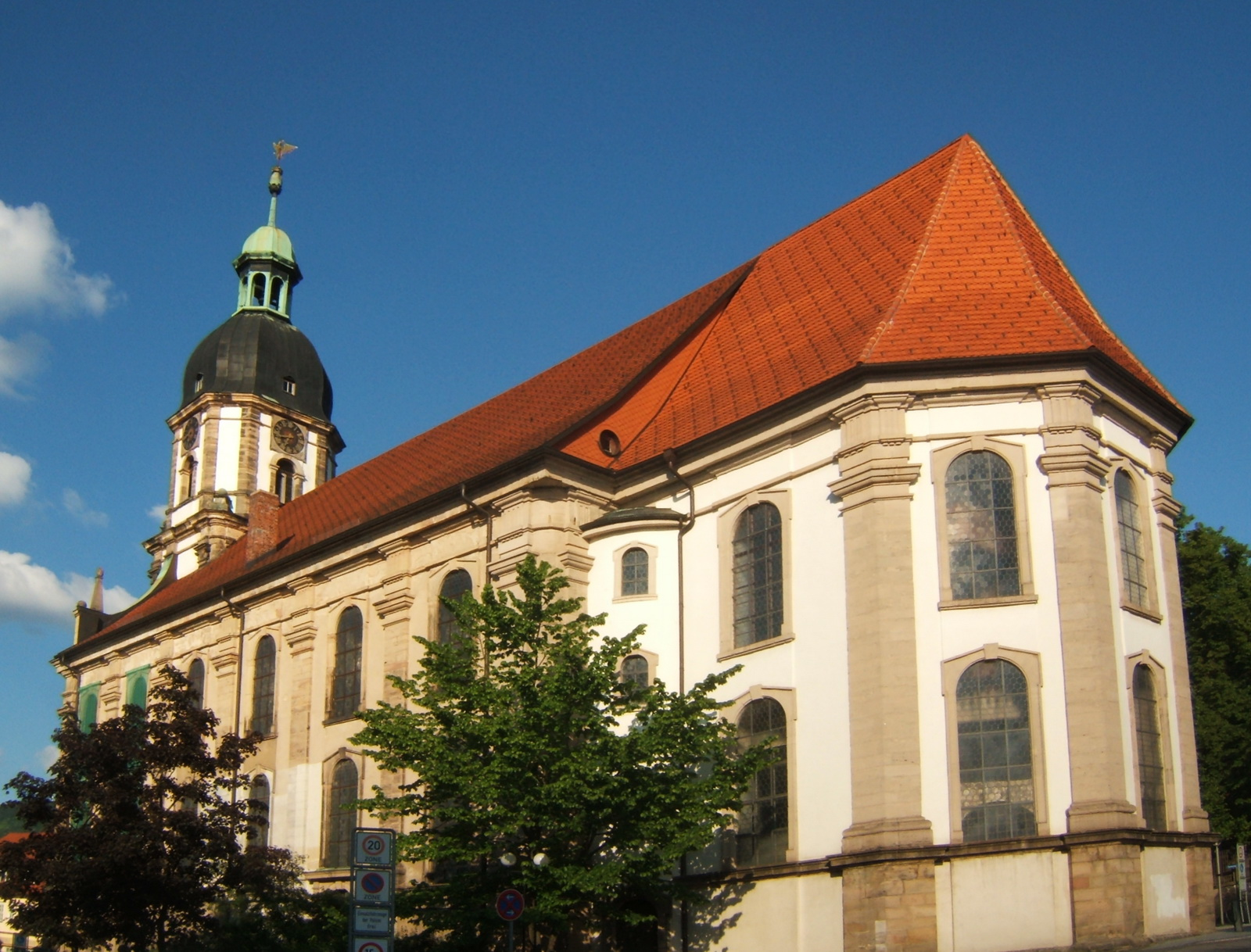 Die Kreuzkirche in Suhl.